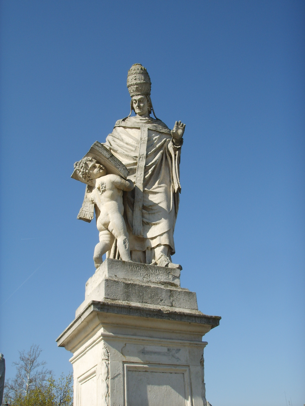 Padova, prato della valle, eugenio IV